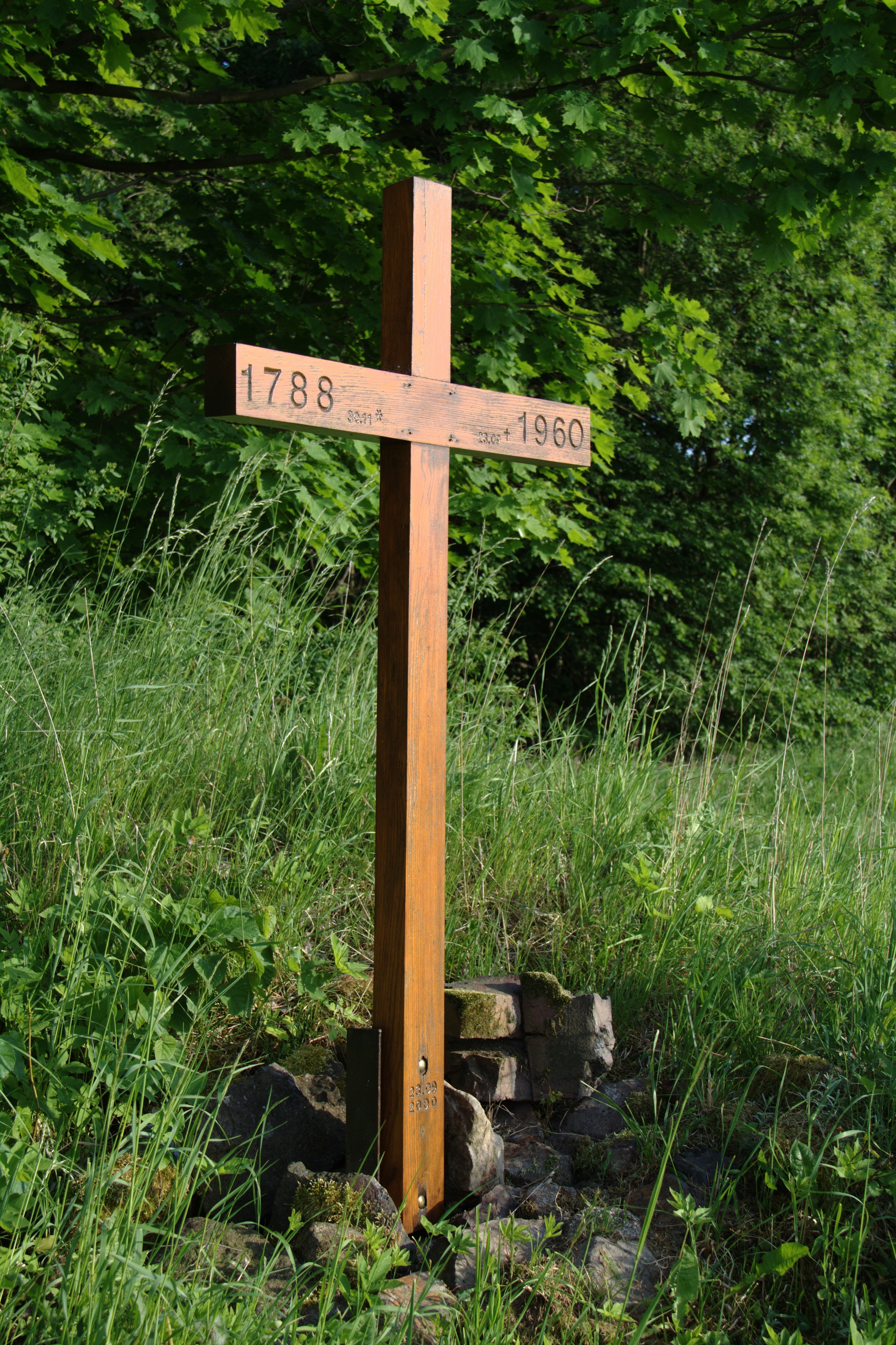 Dřevěný kříž připomíná bývalou obec Fukov